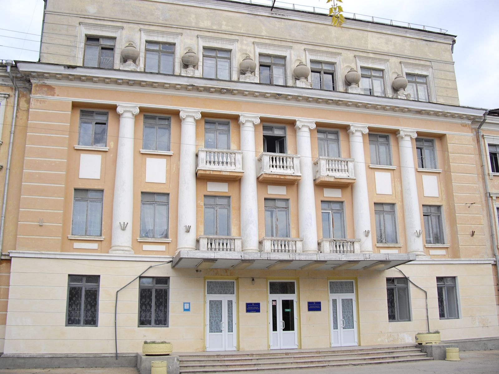 санаторий в Евпатории